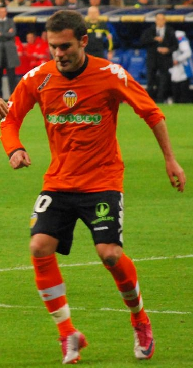 Madrid vs València, lliga 2010-11